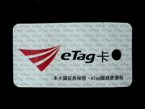 2013年遠通電收eTag卡正面